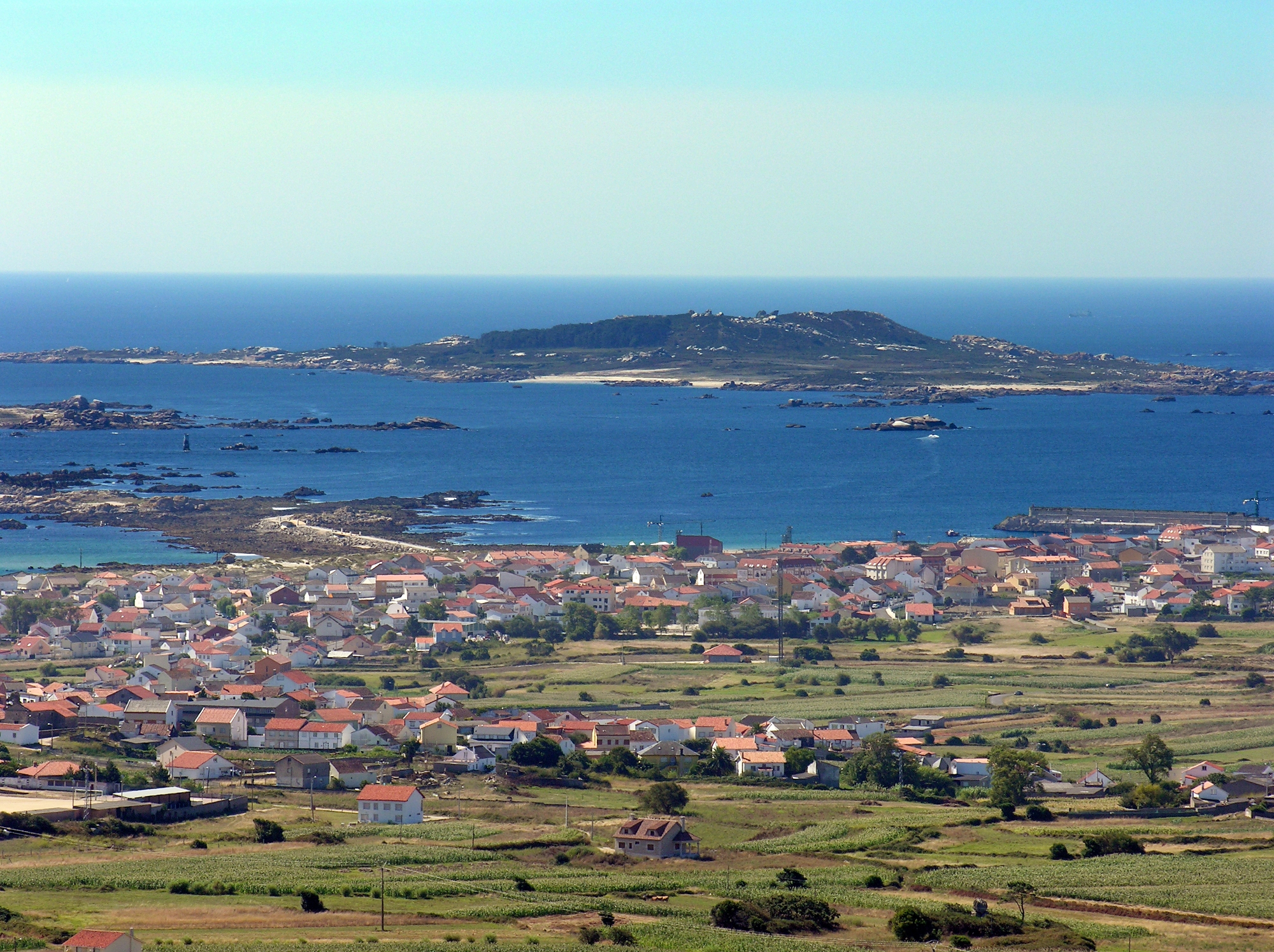 Foto tirada cunha Nikon E8800